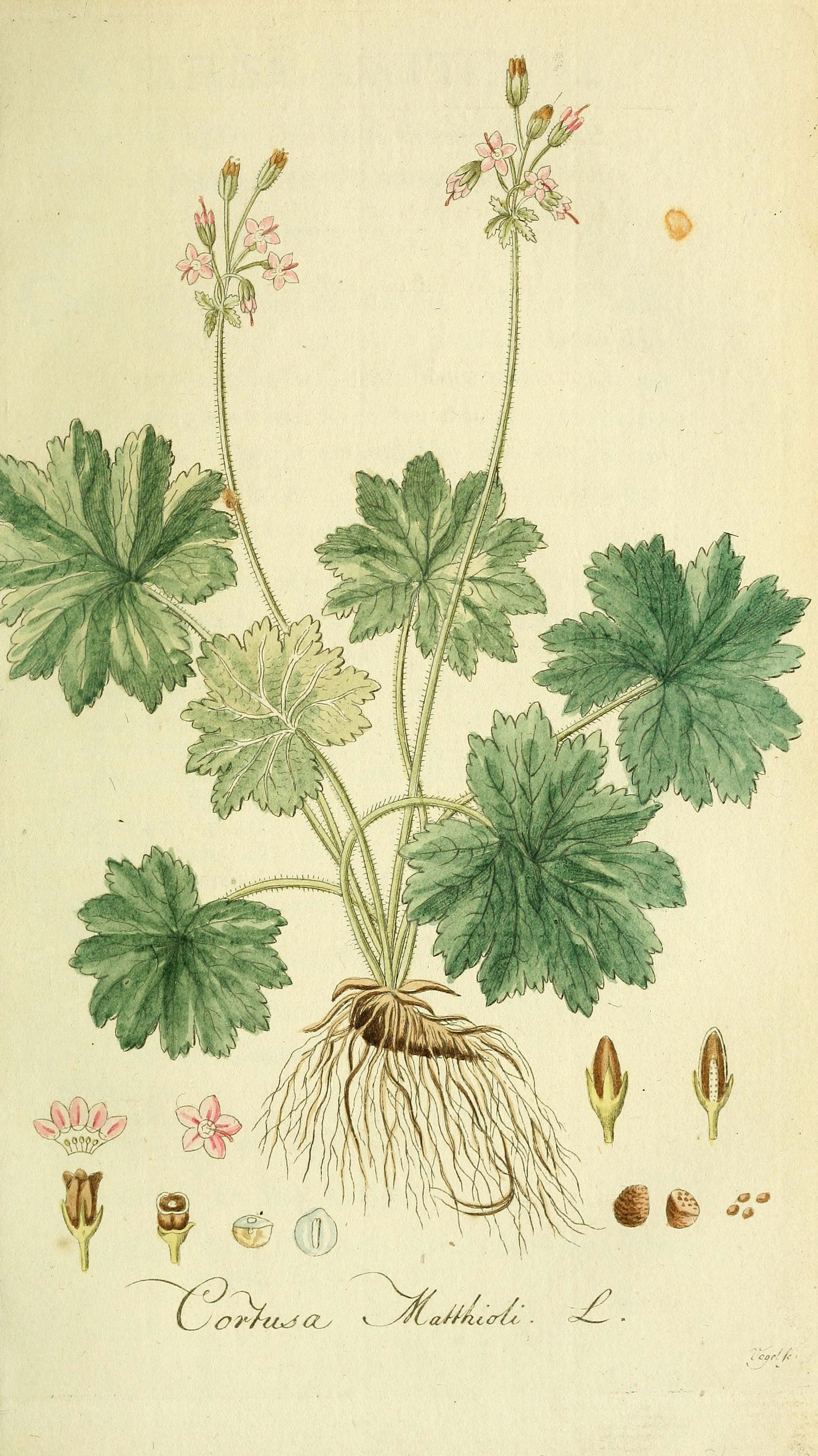 Flora Europaea inchoata. fasc.1-7.